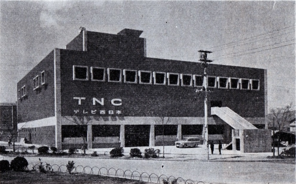 TNCテレビ西日本の放送会館（福岡県八幡市大字尾倉1796番地、通称八幡市本町5丁目、現在の北九州市八幡東区）